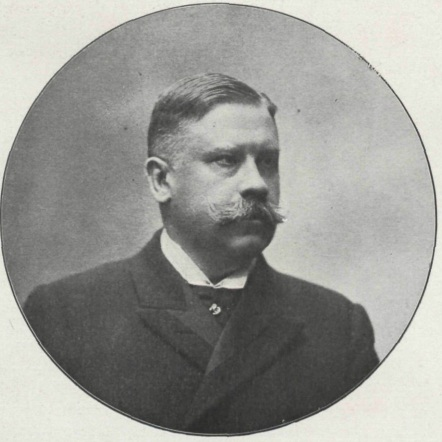 Raimundo Fernández Villaverde, eminente jurisconsulto y hacendista, fallecido en Madrid, el 12 de Julio de 1905, obra del fotógrafo Christian Franzen, recogido en la revista española Álbum Salón.